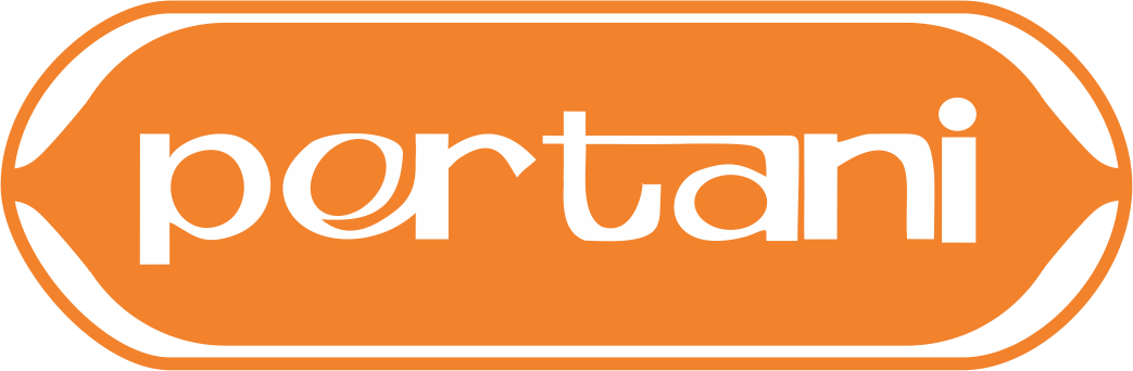 Logo Pertani ke-1 (Tahun 1959- Tahun 2004)